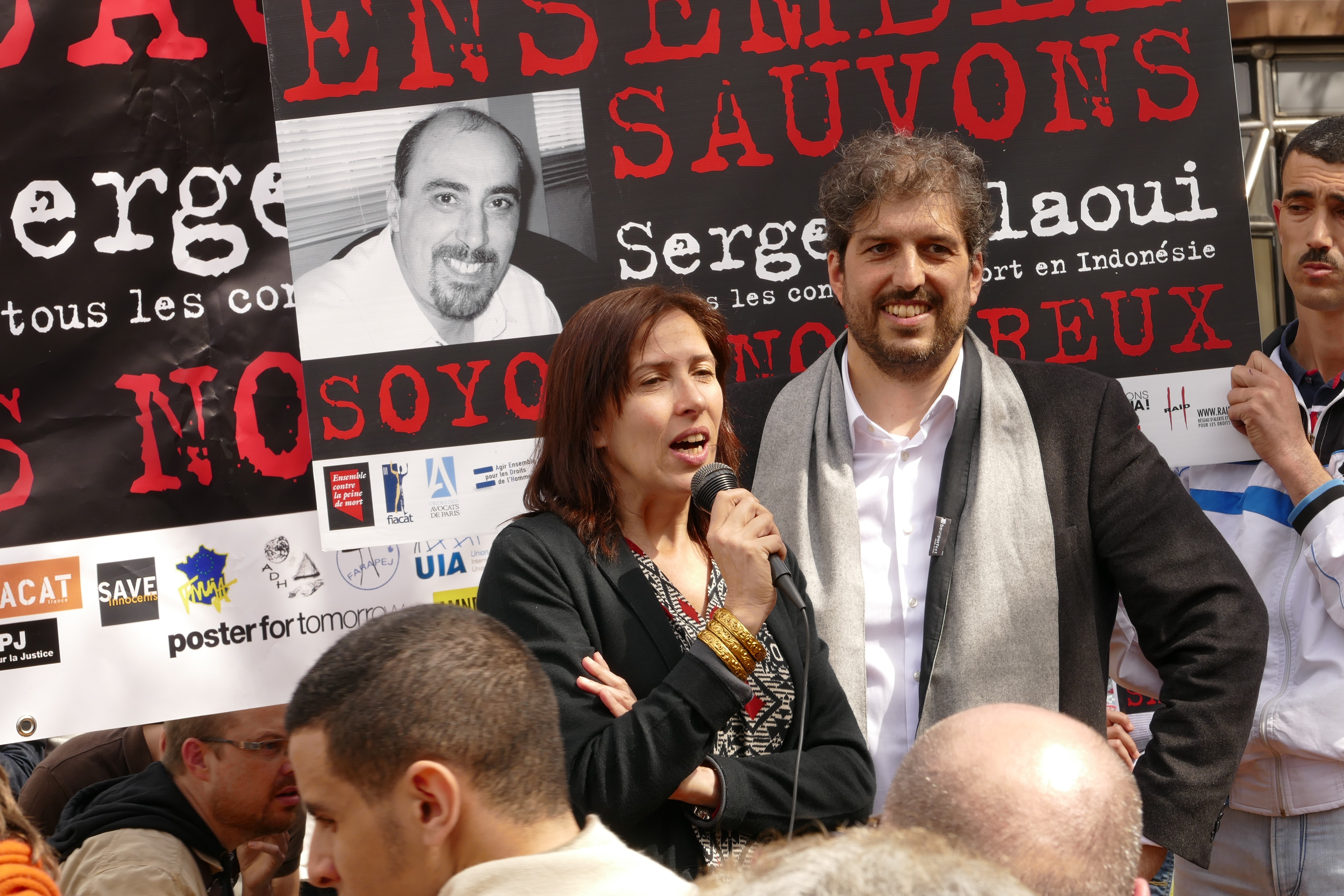 Manifestation de soutien à Serge Atlaoui et contre la peine de mort, le 25 avril 2015 sur la place Edmond-Michelet (Paris, 4e arrond.). Florence Bellivier, présidente de la Coalition internationale contre la peine de mort prend la parole.